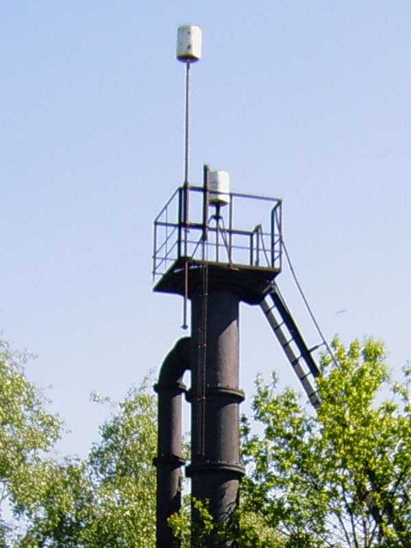 Rieselfeld Boddinsfelde, Detail vom Standrohr